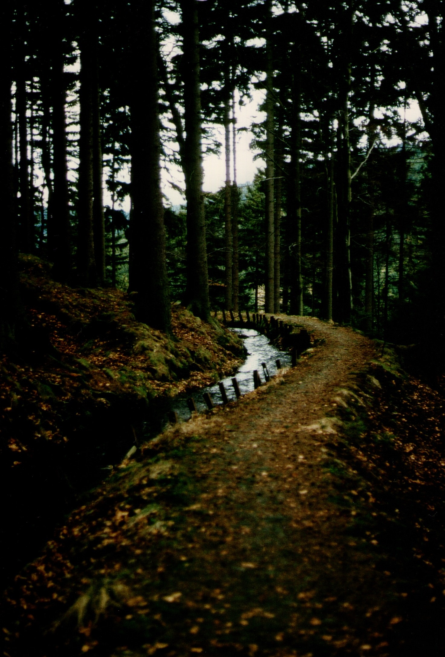 Lautenthaler Kunstgraben zwischen Lautenthal und Wildemann